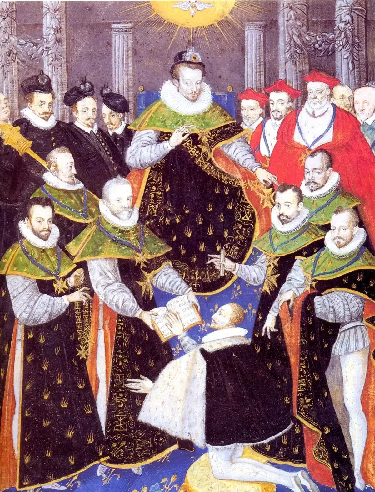 Première cérémonie de l'ordre du Saint Esprit pour la réception de Ludovic de Gonzague, duc de Nevers, pour Henri III le 31 décembre 1578